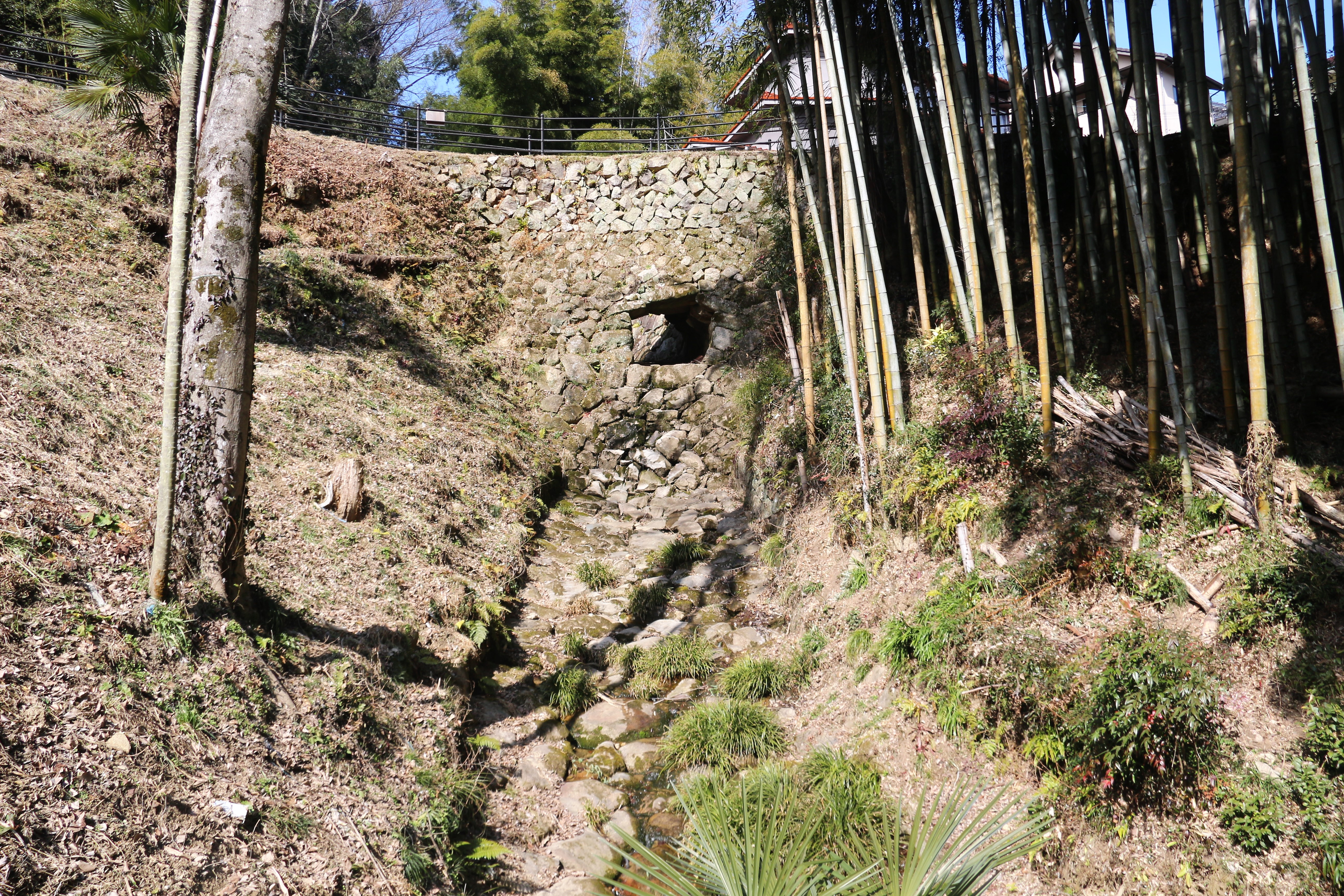 広島県福山市新市町常の金名の郷頭。